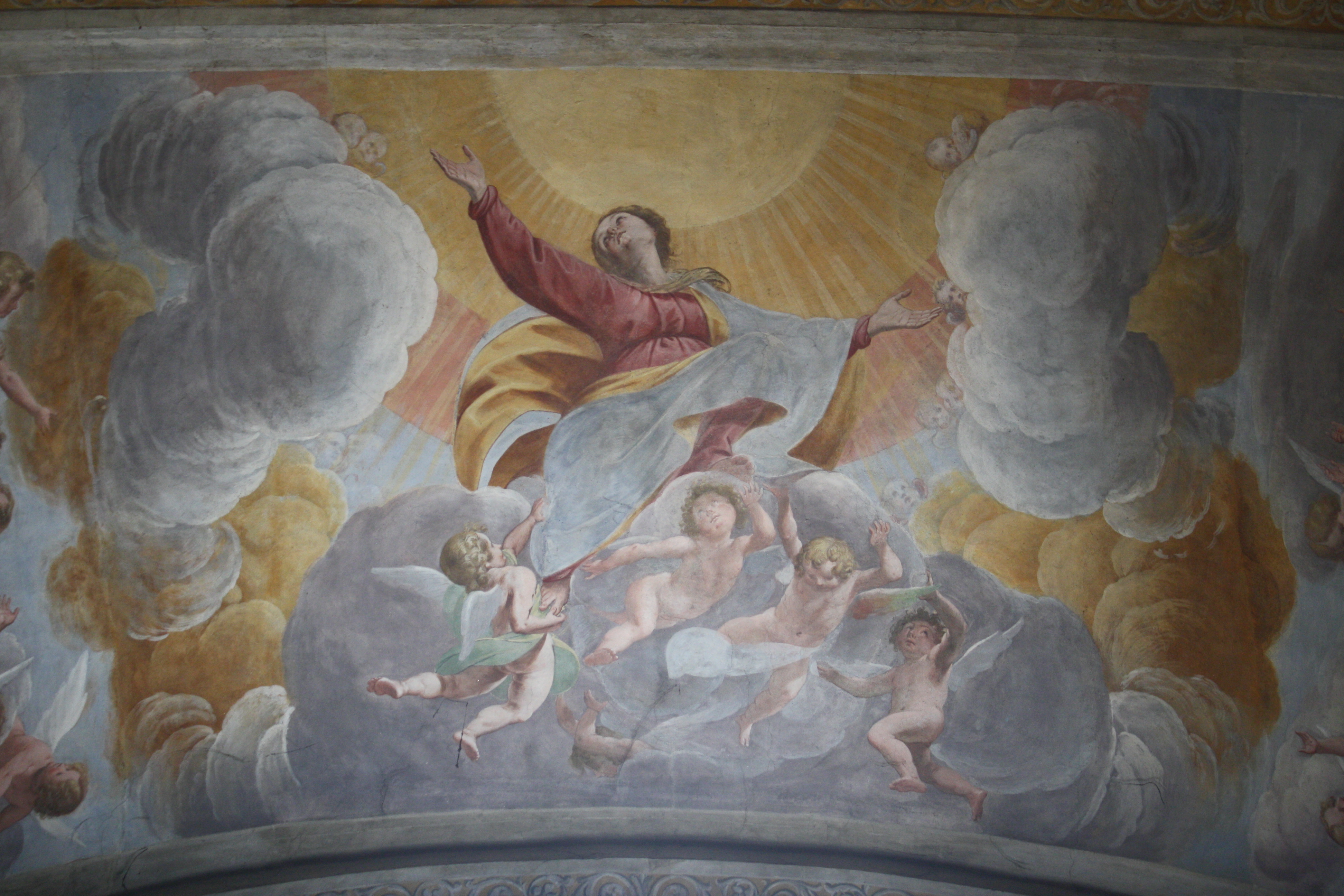 L'interno della basilica di San Magno a Legnano - Cappella dell'Immacolata - Affresco del XVII secolo di Francesco e Giovanni Battista Lampugnani raffigurante l'Assunzione della Vergine